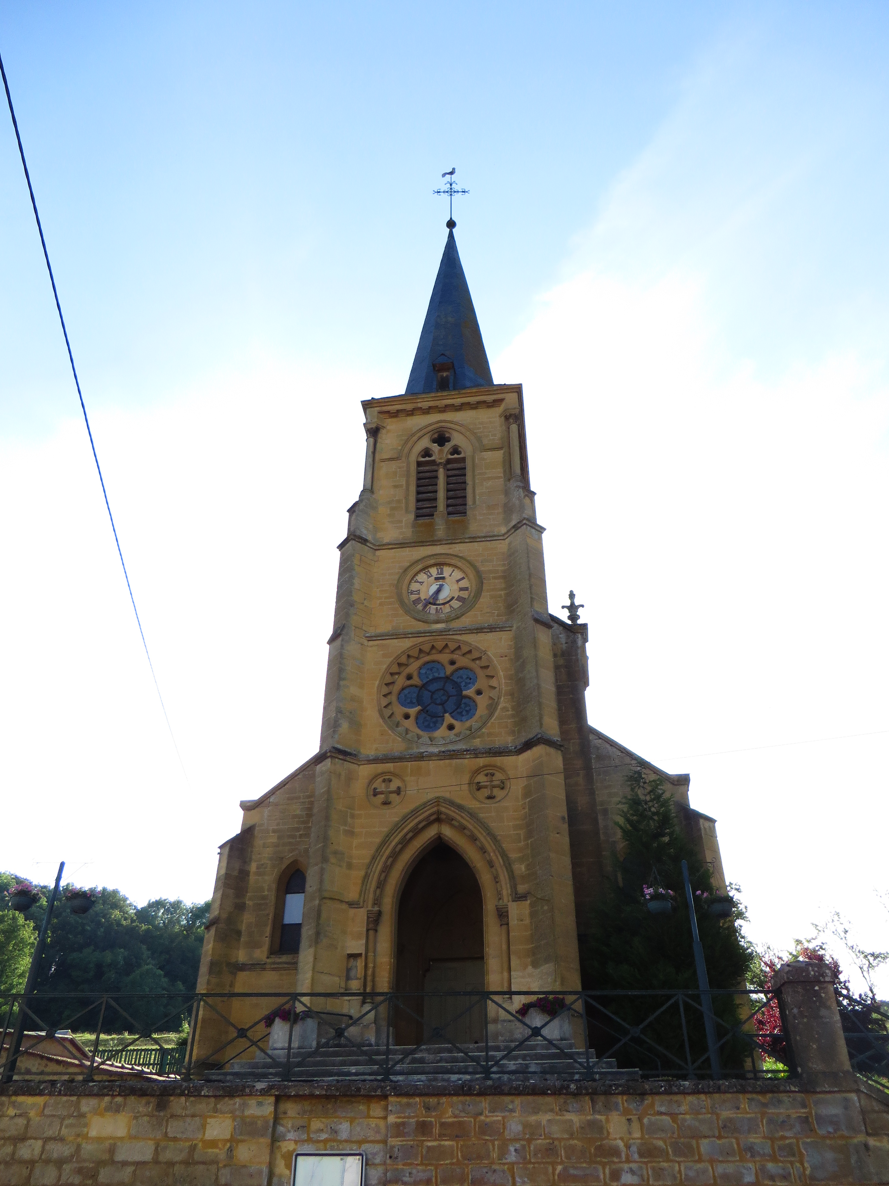 Vigneul-sous-Montmédy L'église Saint-Pierre